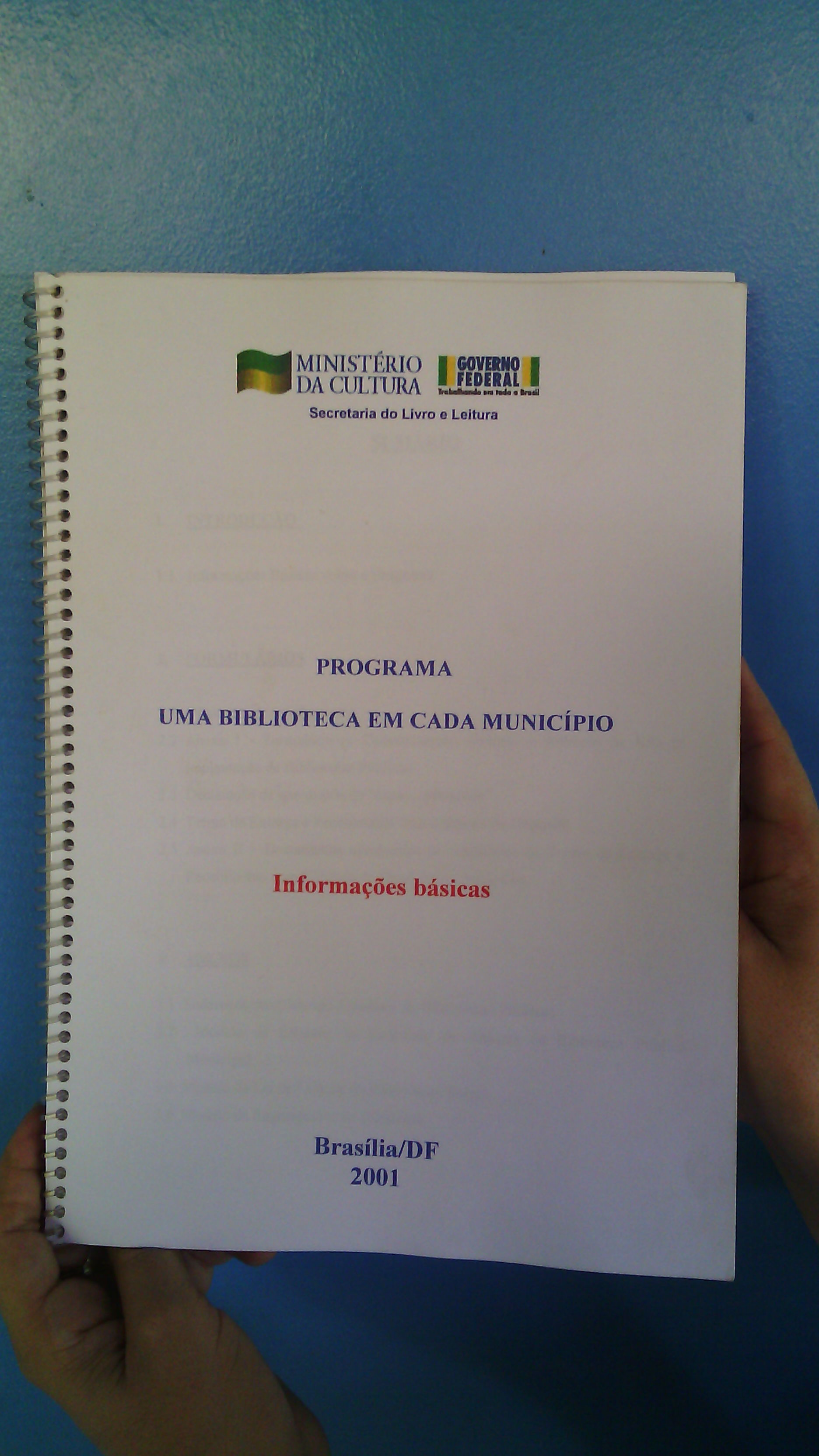 Cartilha de informações básicas do Programa Uma Biblioteca em cada Município, efetivado pelo Ministério da Cultura do Brasil. É uma política que já vem desde o antigo Instituto Nacional do Livro.